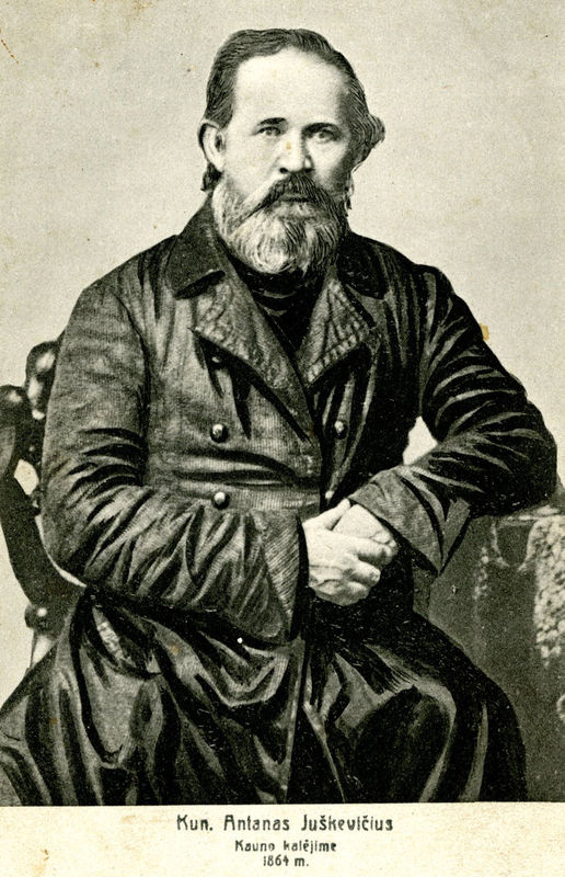 Antanas Juška (1819 m. birželio 16 d. Daujotai, Ariogalos valsčius – 1880 m. lapkričio 1 d. Kazanė, 1990 m. perlaidotas Veliuonoje) – Lietuvos kunigas, tautosakininkas, leksikografas.